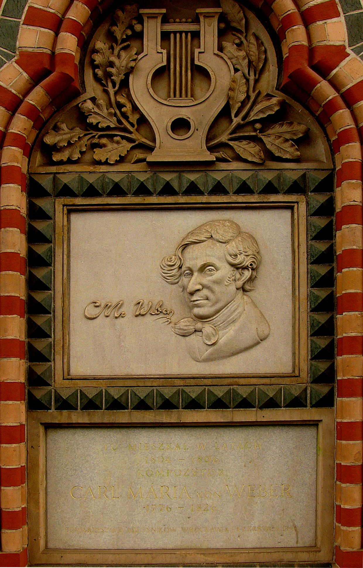 Gedenktafel für Carl Maria von Weber an einer Hausfassade in Breslau.